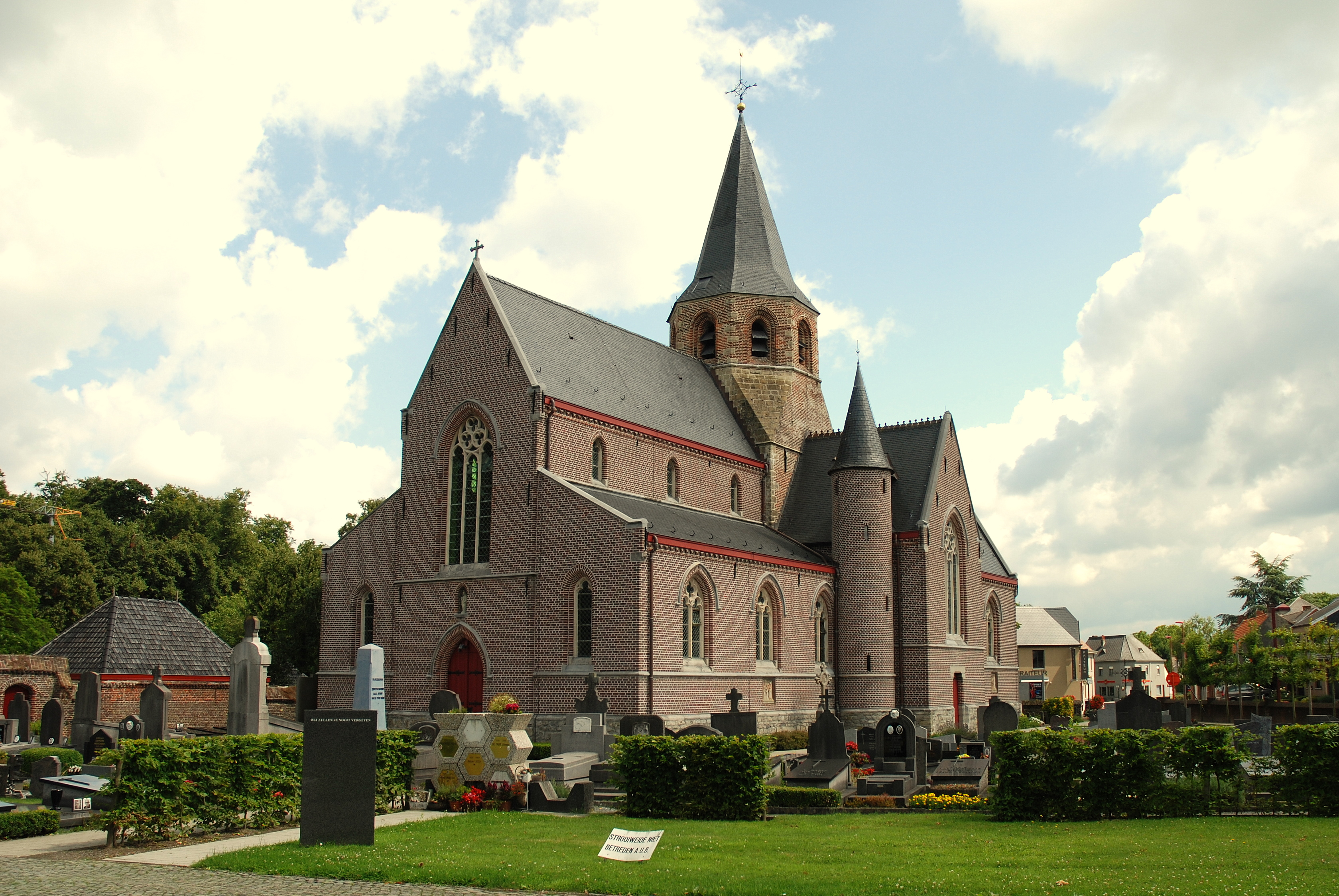 Sint-Martinuskerk te Schelderode, België